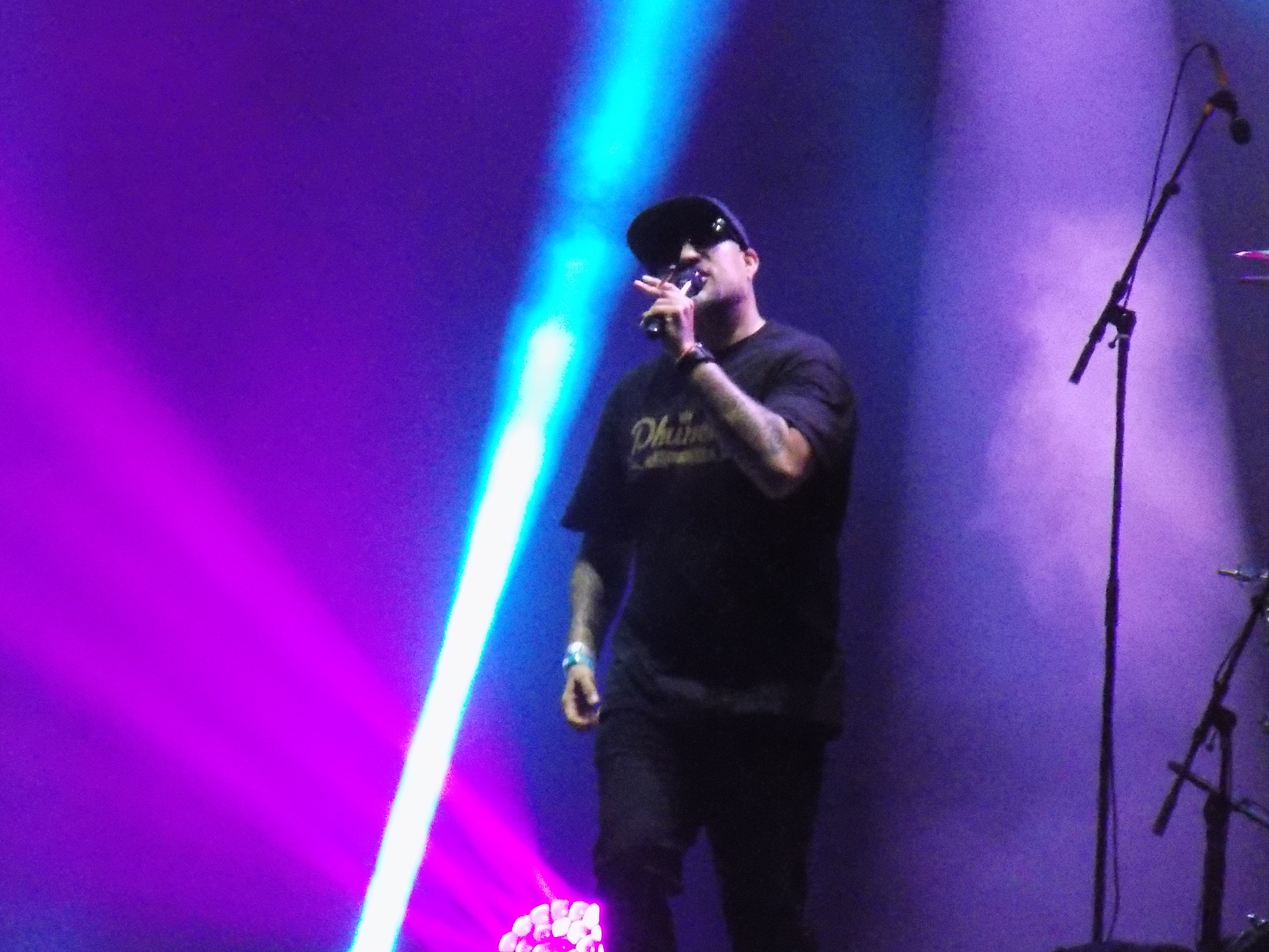 Cypress Hill à l'édition 2017 du Cabaret Vert à Charleville-Mézières le 24 août 2017.